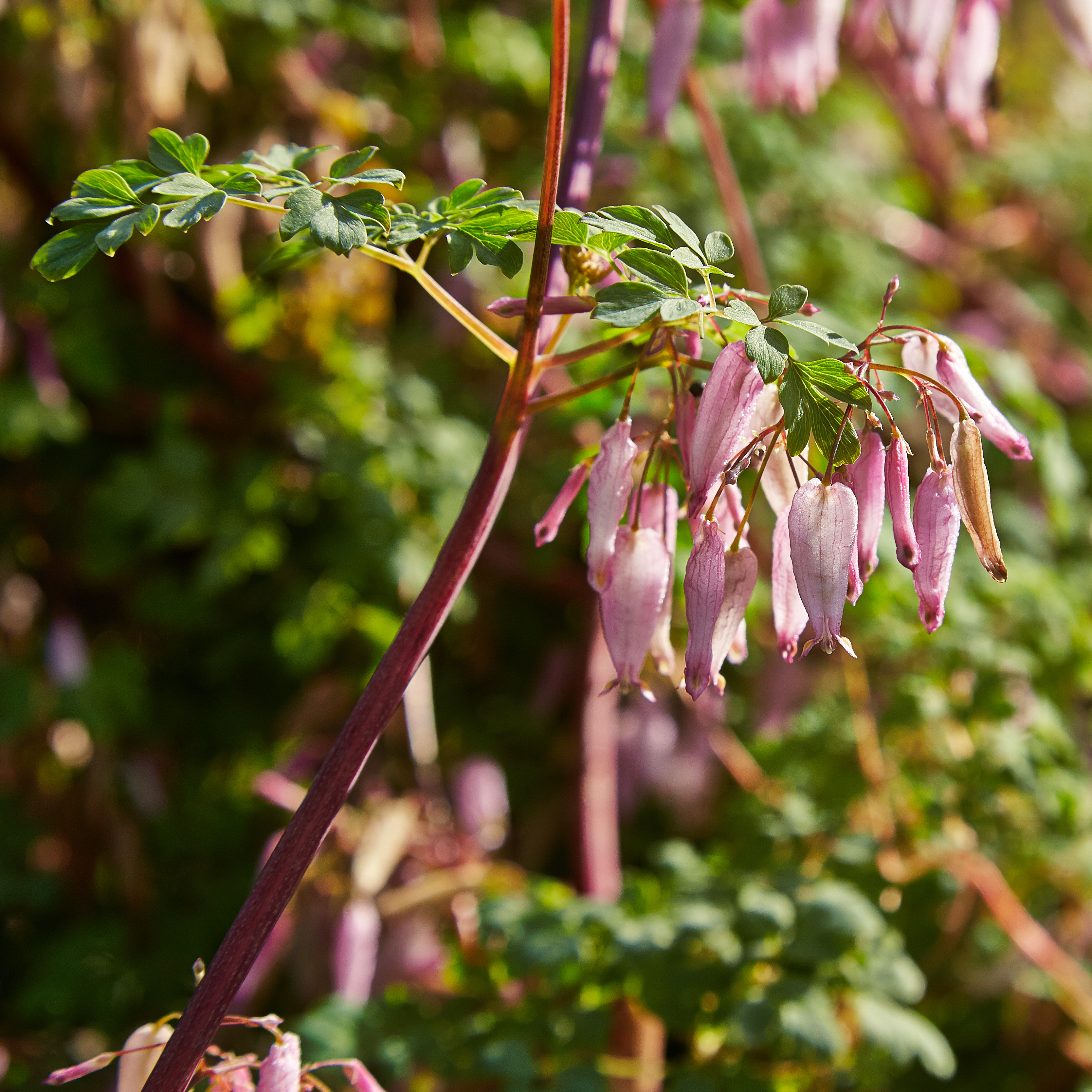 Adlumia fungosa i Bergianska trädgården.